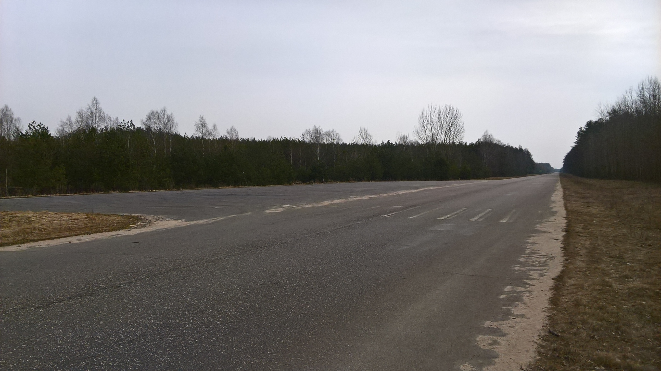 Drogowy odcinek lotniskowy na drodze wojewódzkiej DW604 między miejscowościami Ruskowo a Przeździęk Wielki o długości 2200 m, szerokości 10 m i stojankami z dwóch stron.